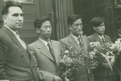 Георги Караславов с гости от Северна Корея, водещи корейски деца за подпомагането им в България, на гарата в с. Генерал Тошево.